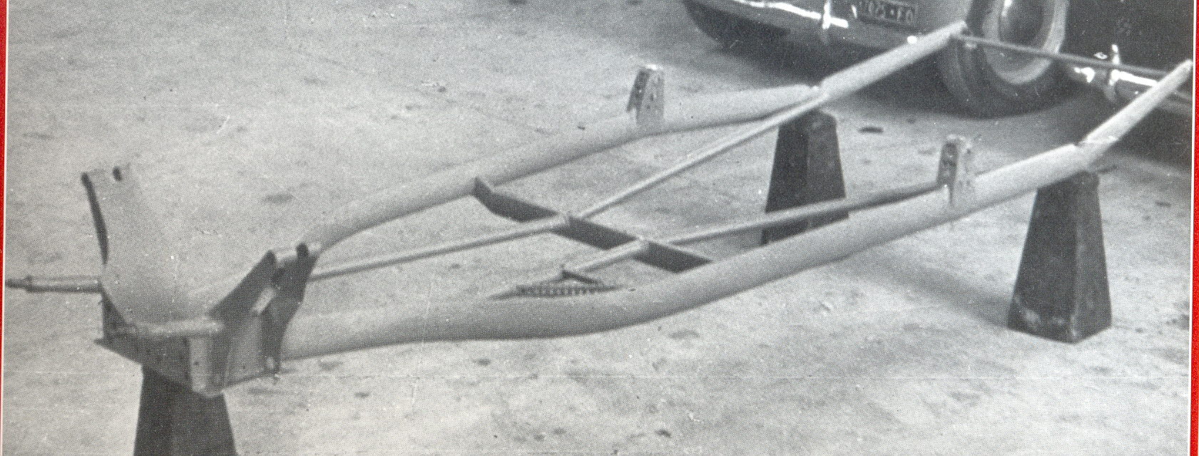 Telaio Bandini 750 sport siluro tratta da Libro: Bandini (storia della vita e automobili di Ilario Bandini)